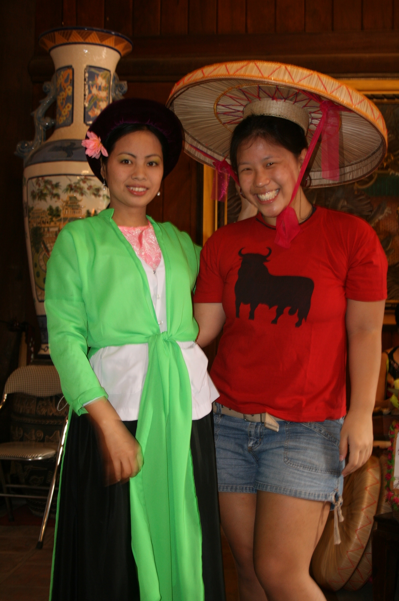 Một cô gái mặc áo tứ thân